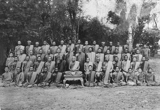 หลวงปู่เสาร์ กนฺตสีโล และคณะพระภิกษุสามเณร ณ วัดป่าข่าโคม จ.อุบลราชธานี